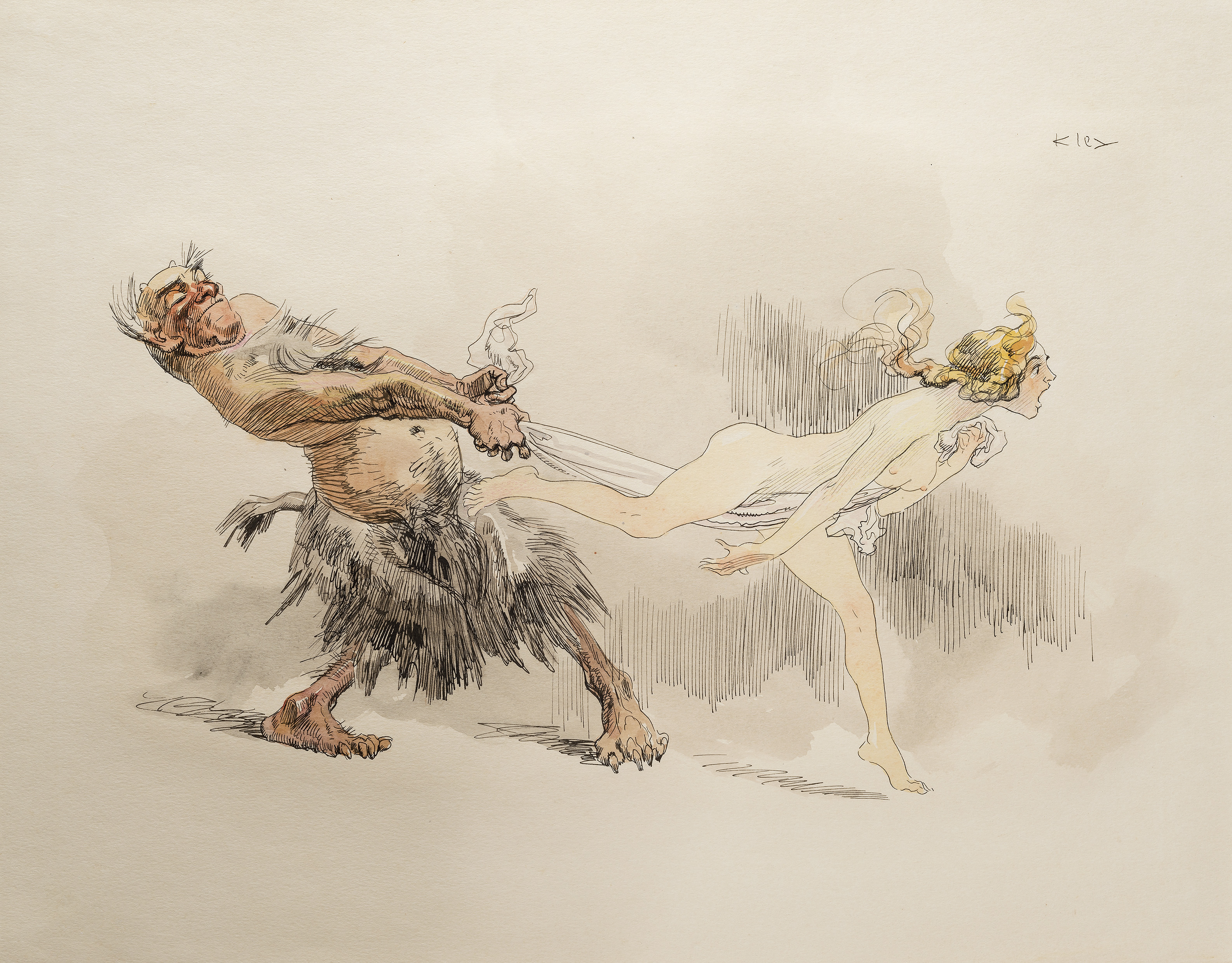 Heinrich Kley (1863-1945) Gefangen Tusche, Aquarell und Farbstifte auf Papier 33,5 x 43,5 cm Rechts oben signiert